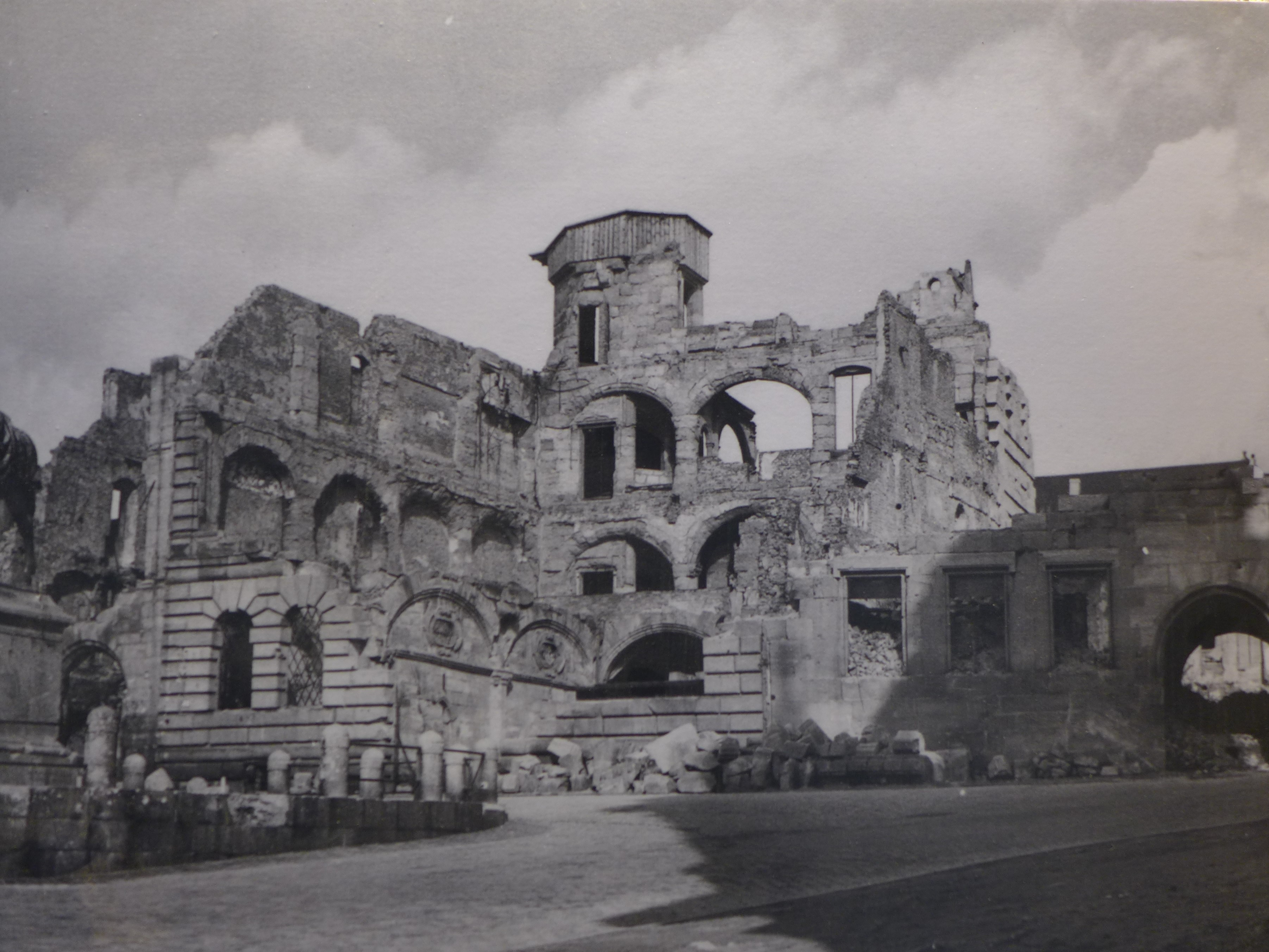 Pellerhaus Nürnberg, Zustand nach der Zerstörung (Stadtarchiv Nürnberg)